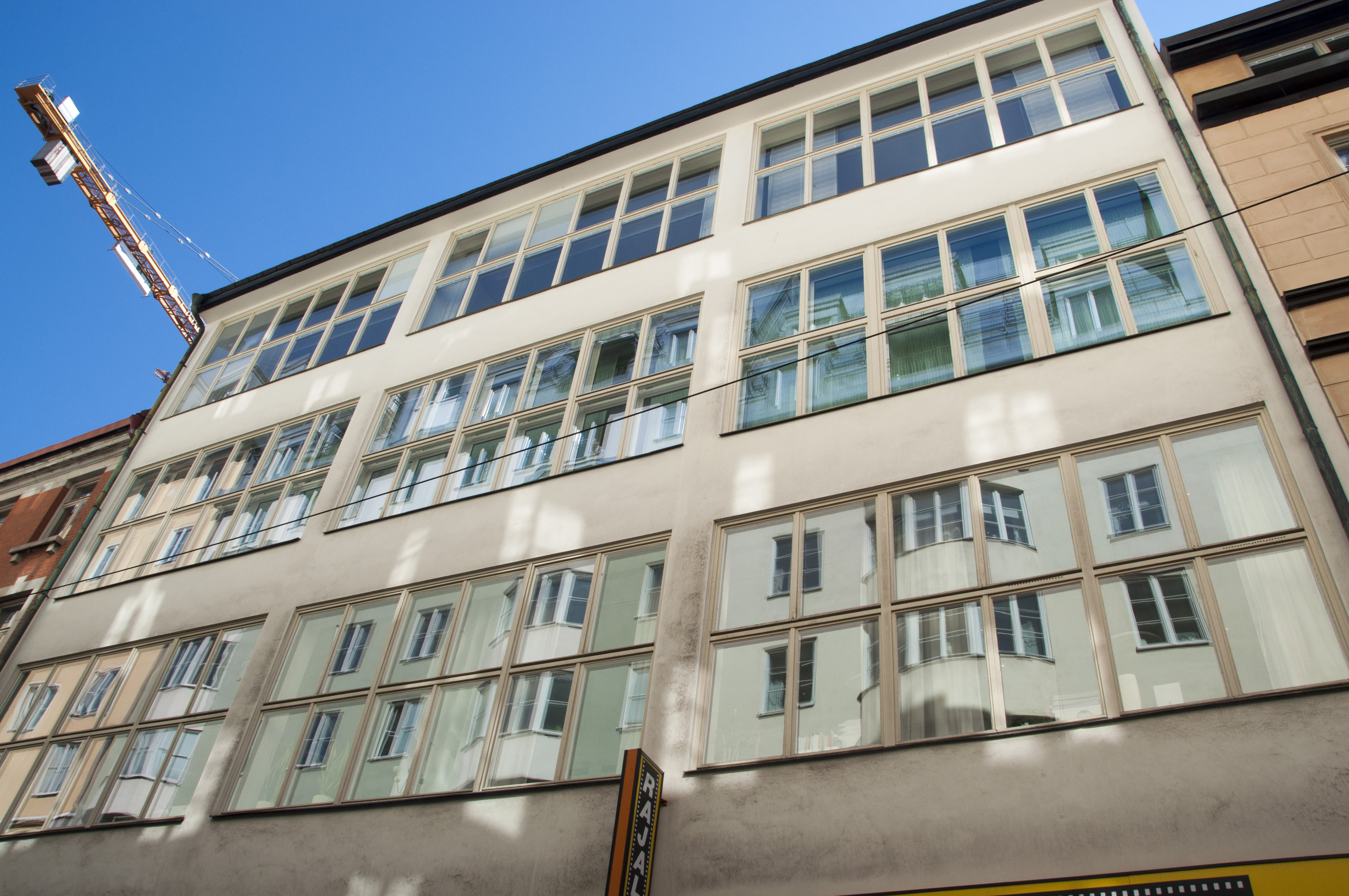 Brunkhalsen 8, Herkulesgatan 11 Stockholm. Byggnadsår 1930-1932. Byggherre Esselte. Arkitekt Ture Wennerholm Byggmästare A Olsson